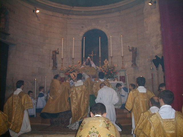 Liturgie neo-gallicane - Messe en rite versaillais - Élévation de l'hostie